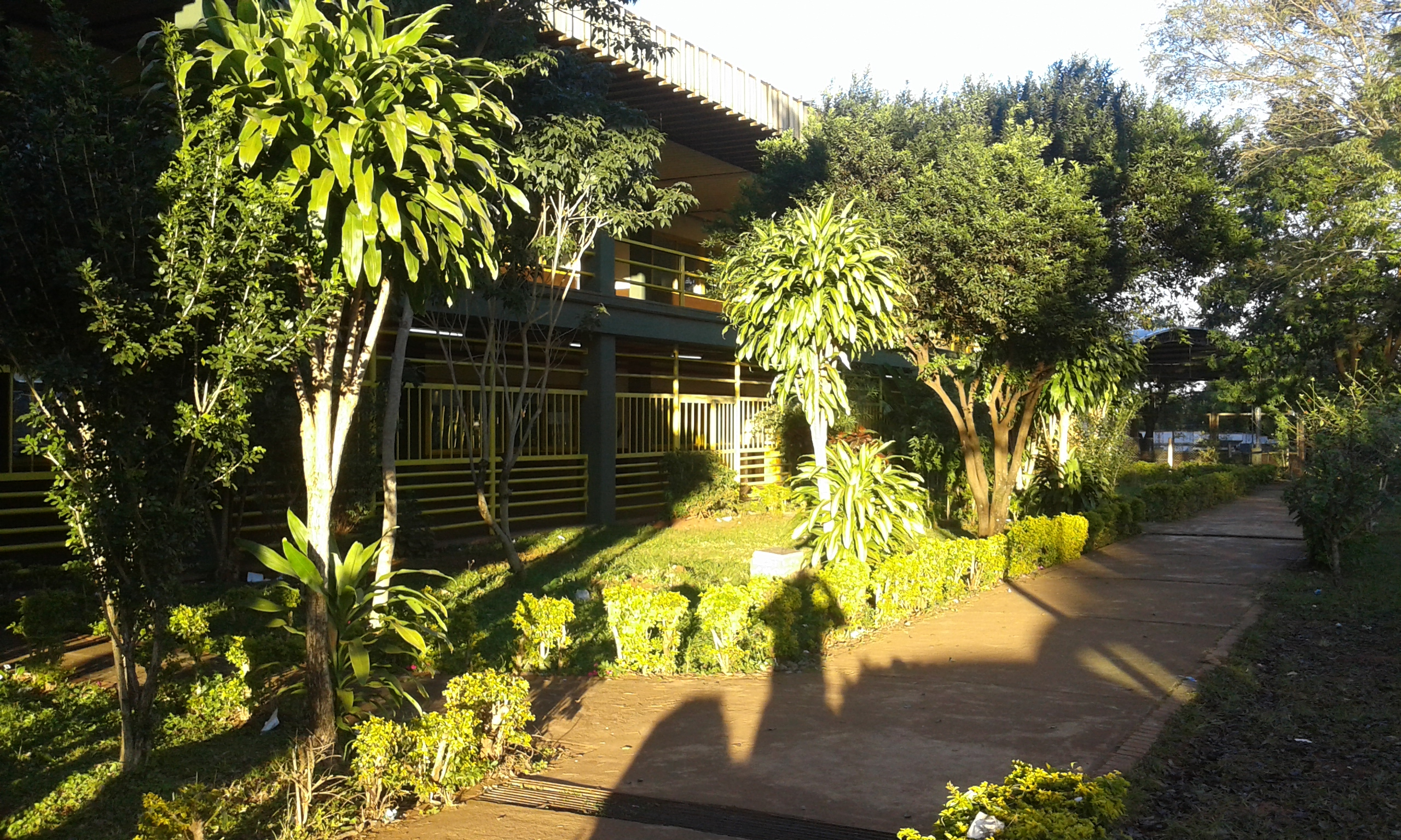 Escuela secundaria de la ciudad de Posadas, situada en el Barrio Parque Adam